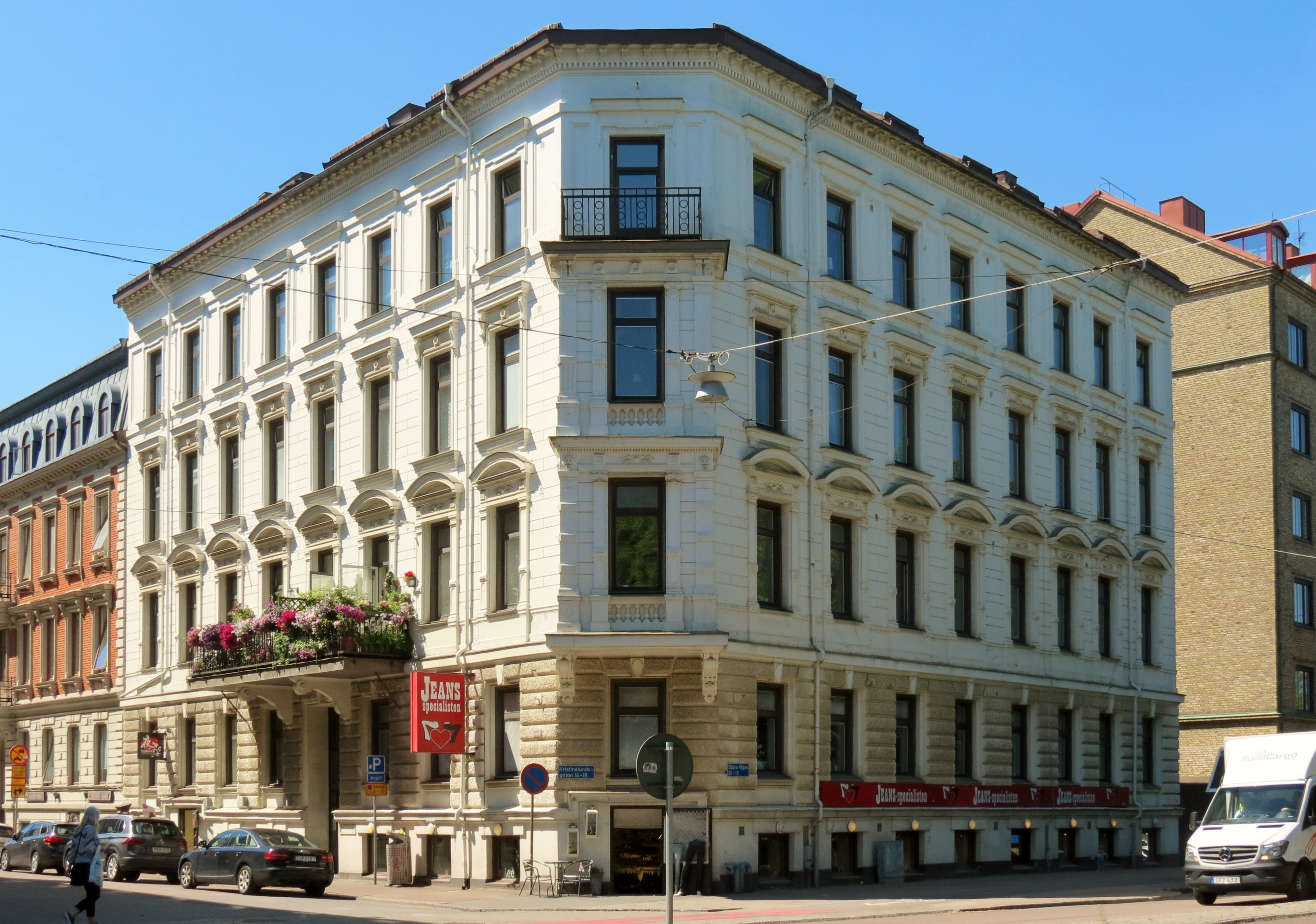 Hörnfastigheten vid Kristinelundsgatan 18 och Södra Vägen 21 i Göteborg. I källarplanet klädbutiken Jeansspecialisten.